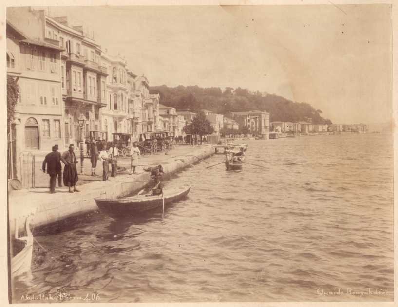 Abdullah brothers - Quai de Bouyukdéré in Istanbul, catalogue number "Abdullah frères n. 406"